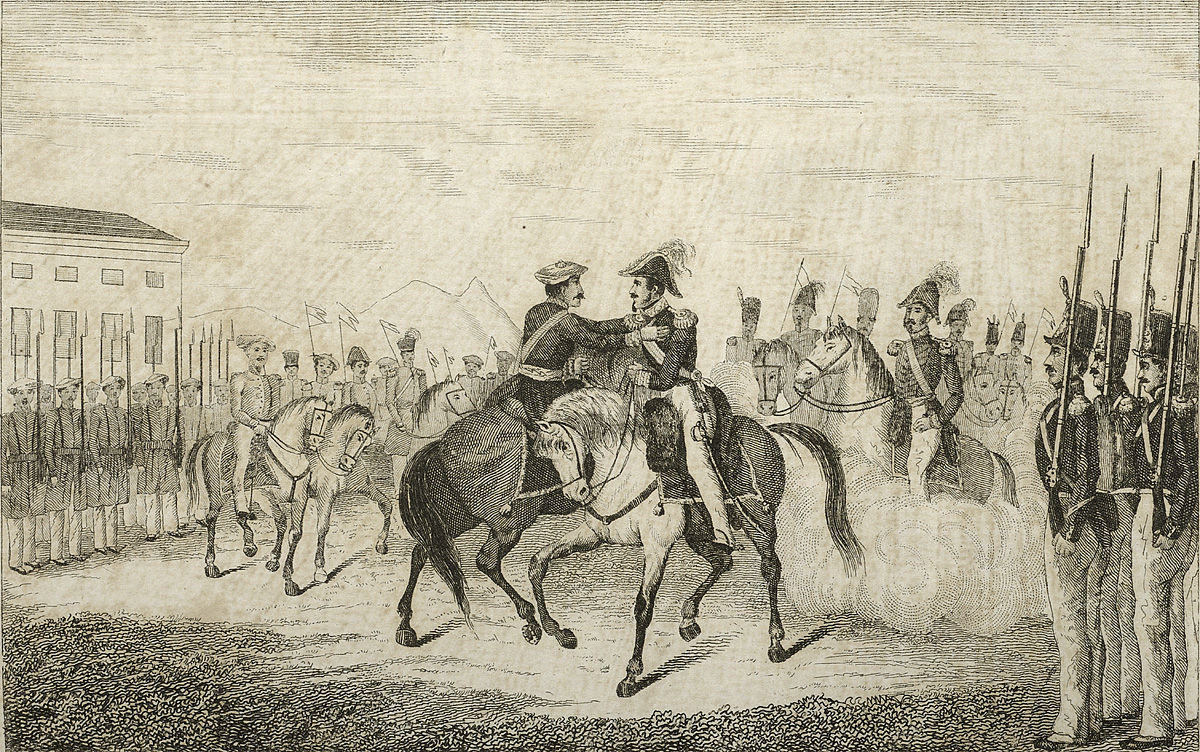 Museo_Zumalakarregi_Albumsigloxix_000553.JPG